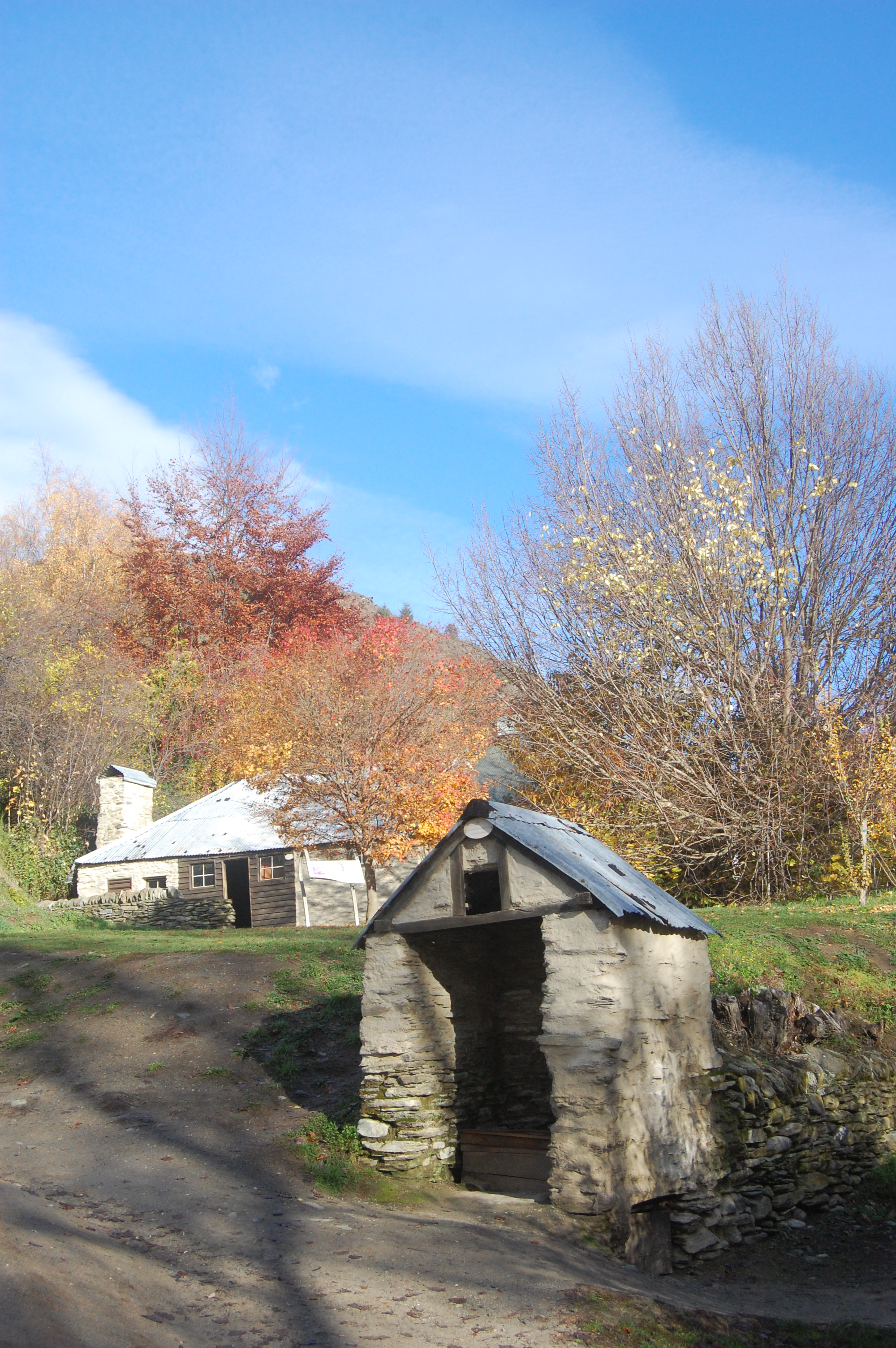 Arrowtown